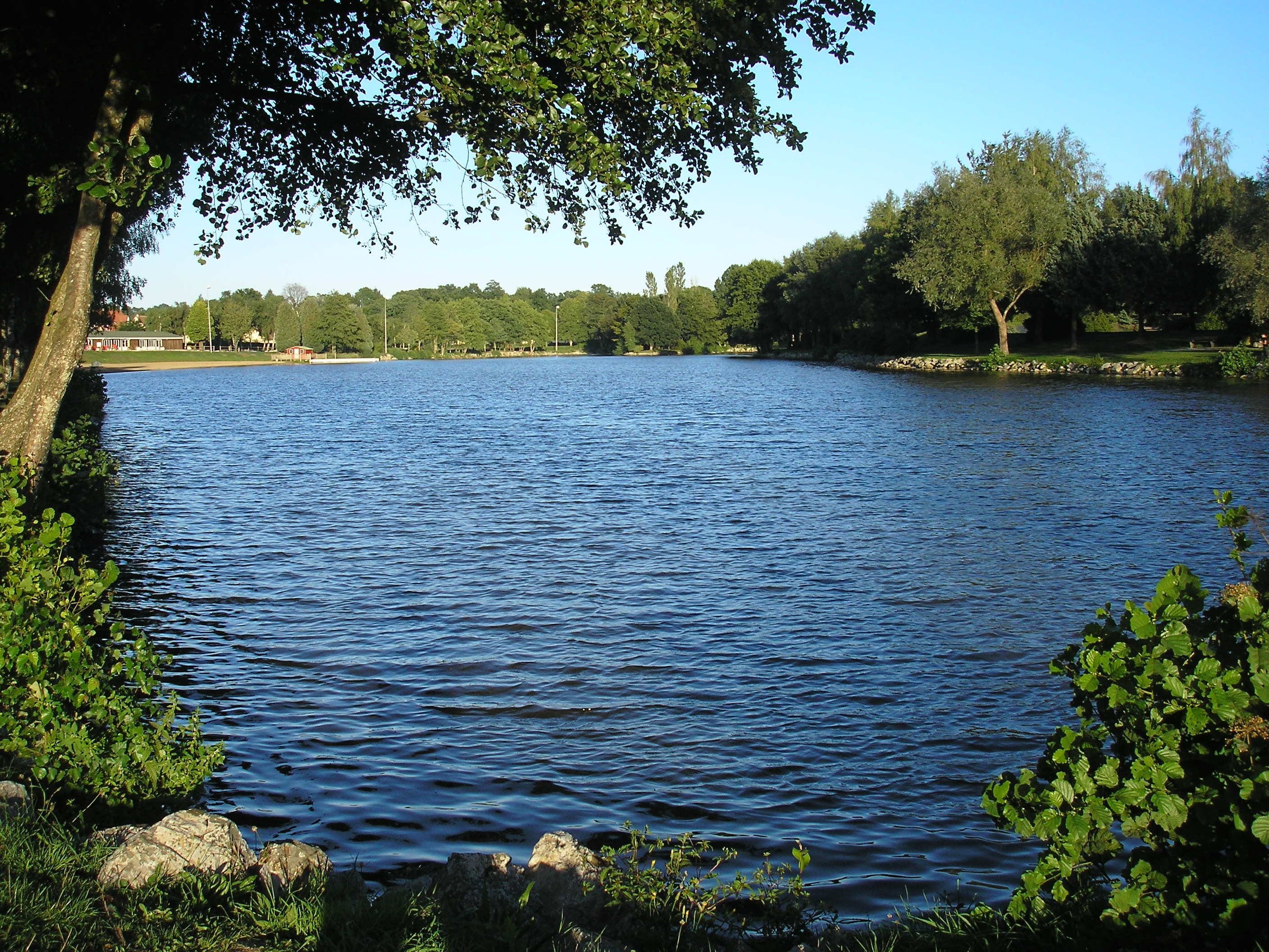 La Ferrière-aux-Étangs (Normandie, France). L'étang de La Ferrière.